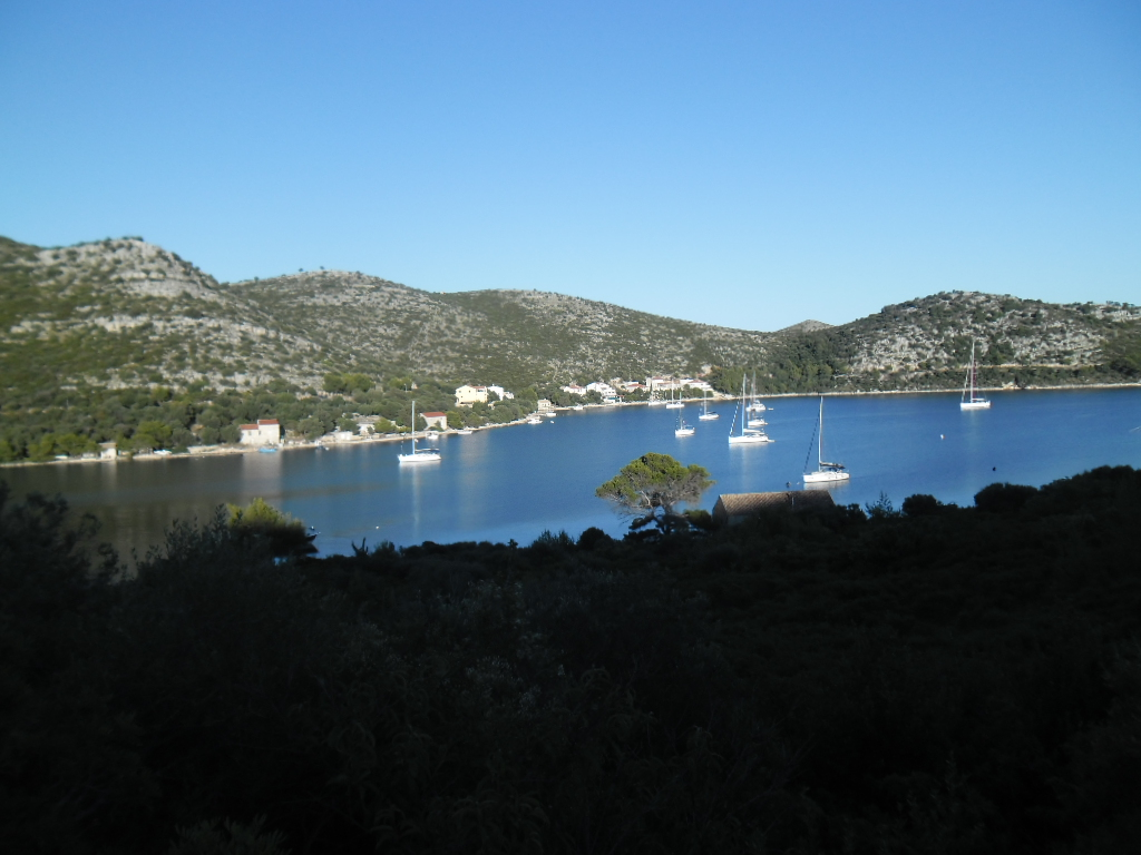 Skrivena Luka na otoku Lastovu